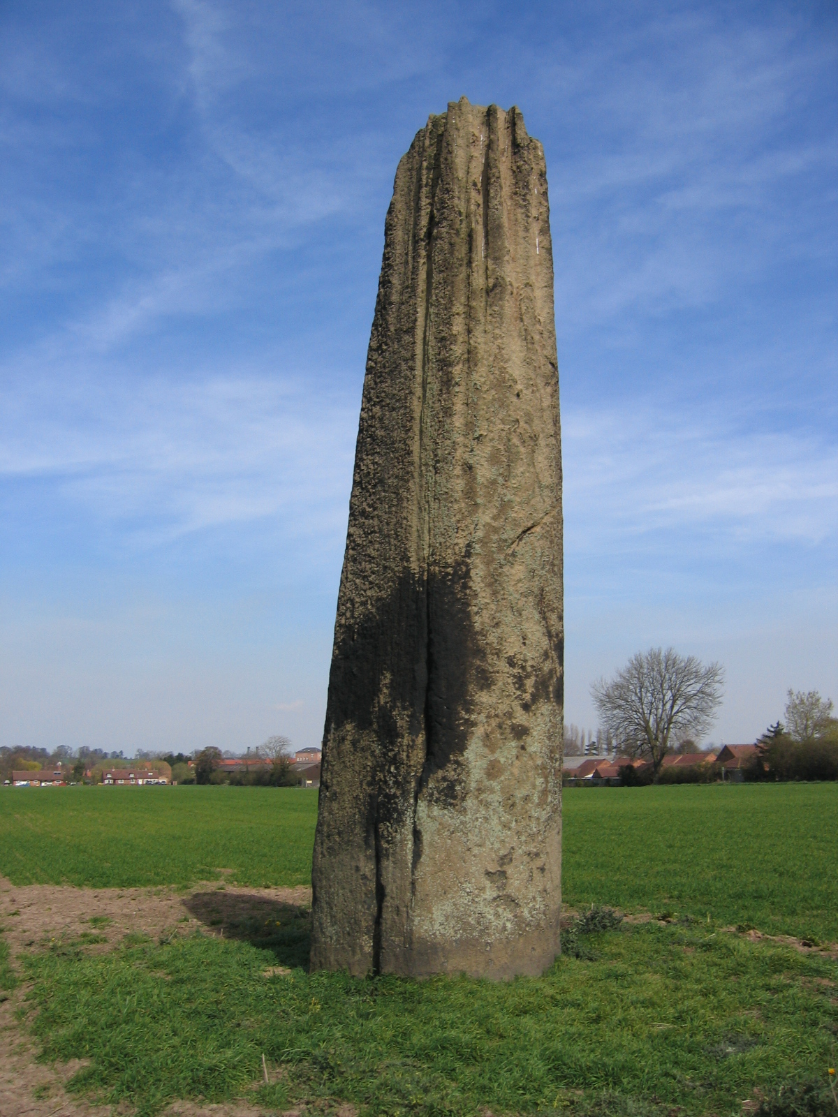 Una delle Frecce del Diavolo. Origine En.Wikipedia